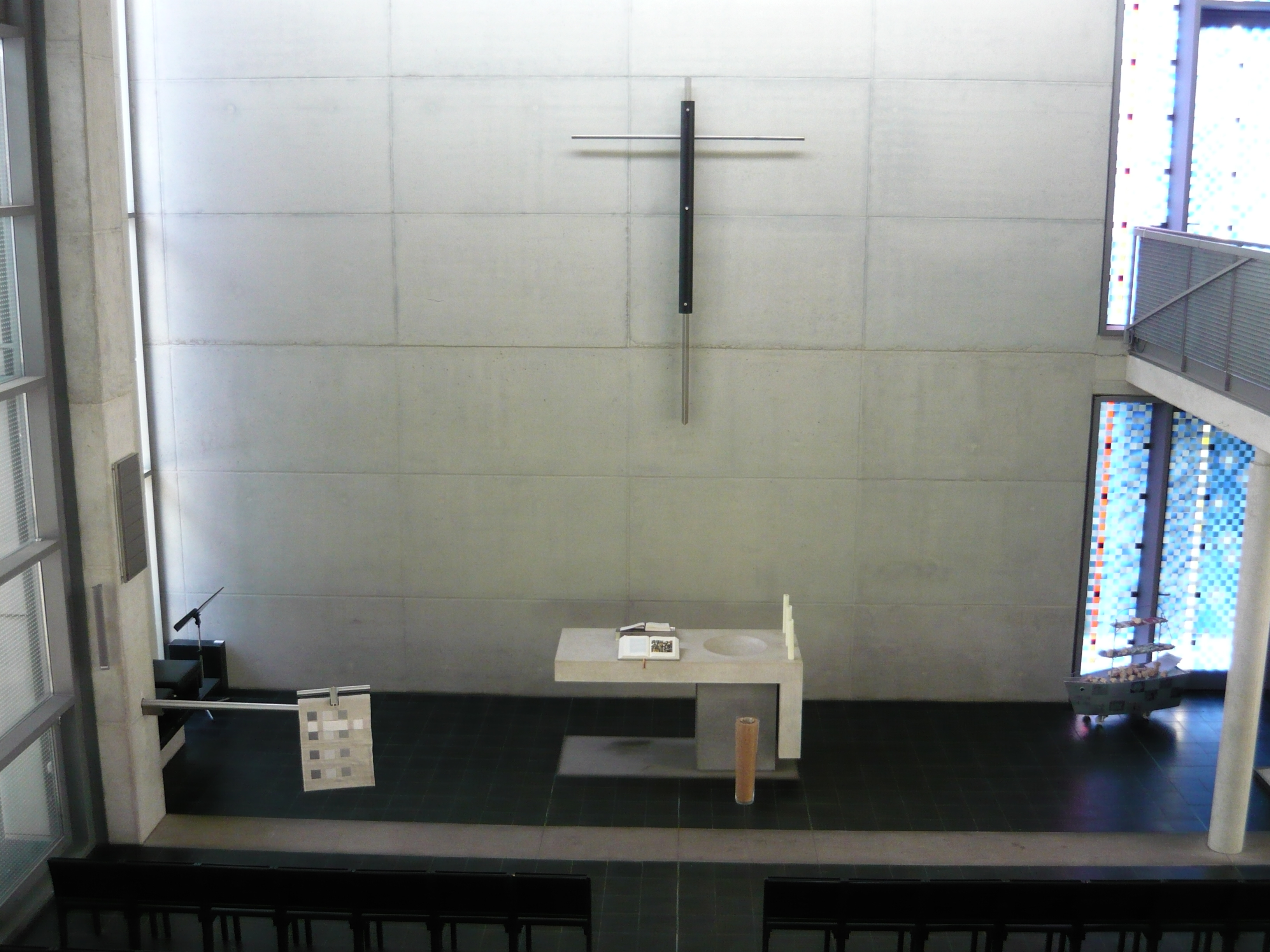 Blick in den Altarraum, Mai 2012